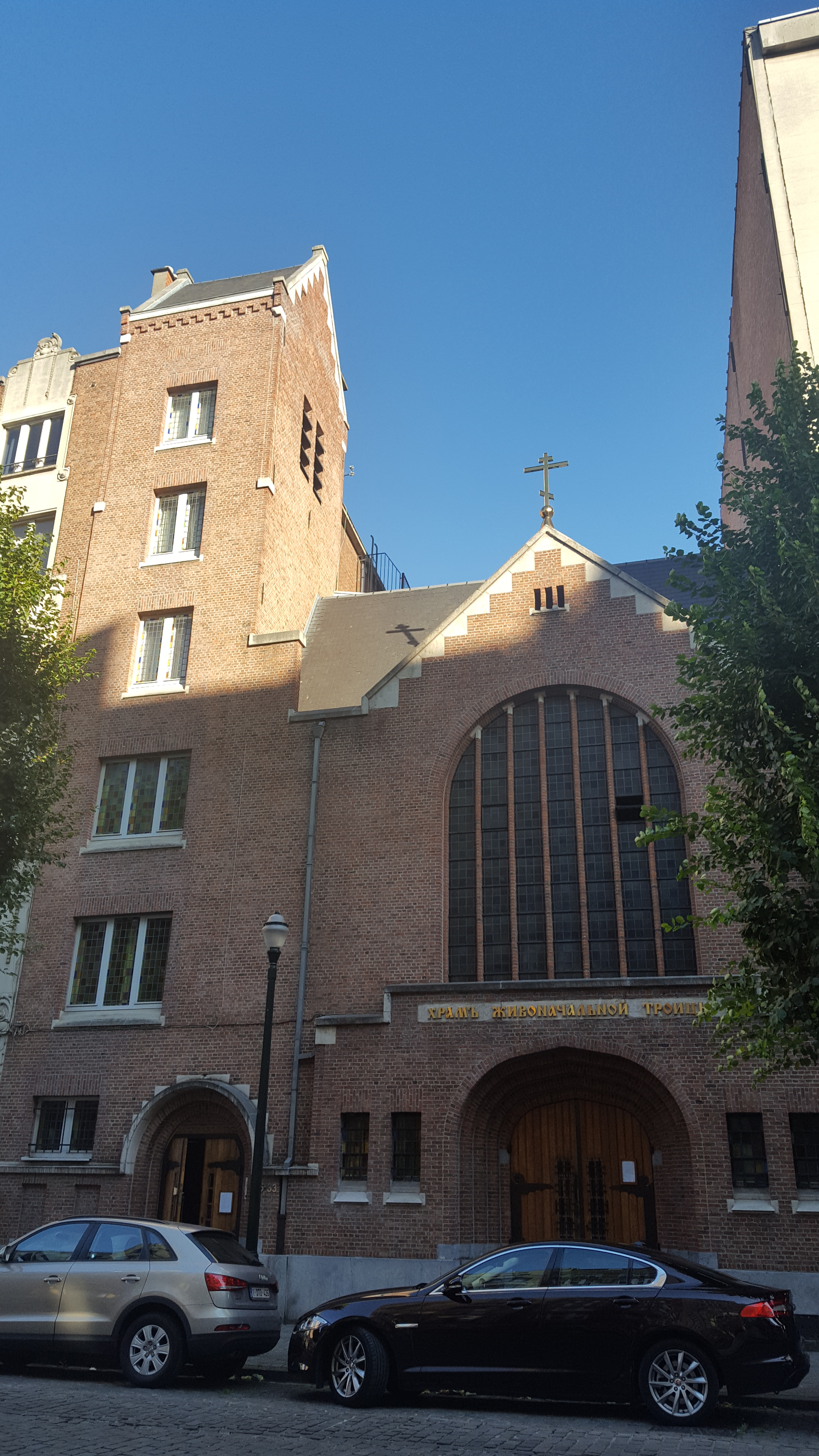 Heilige Drieheidskerk, Brussel